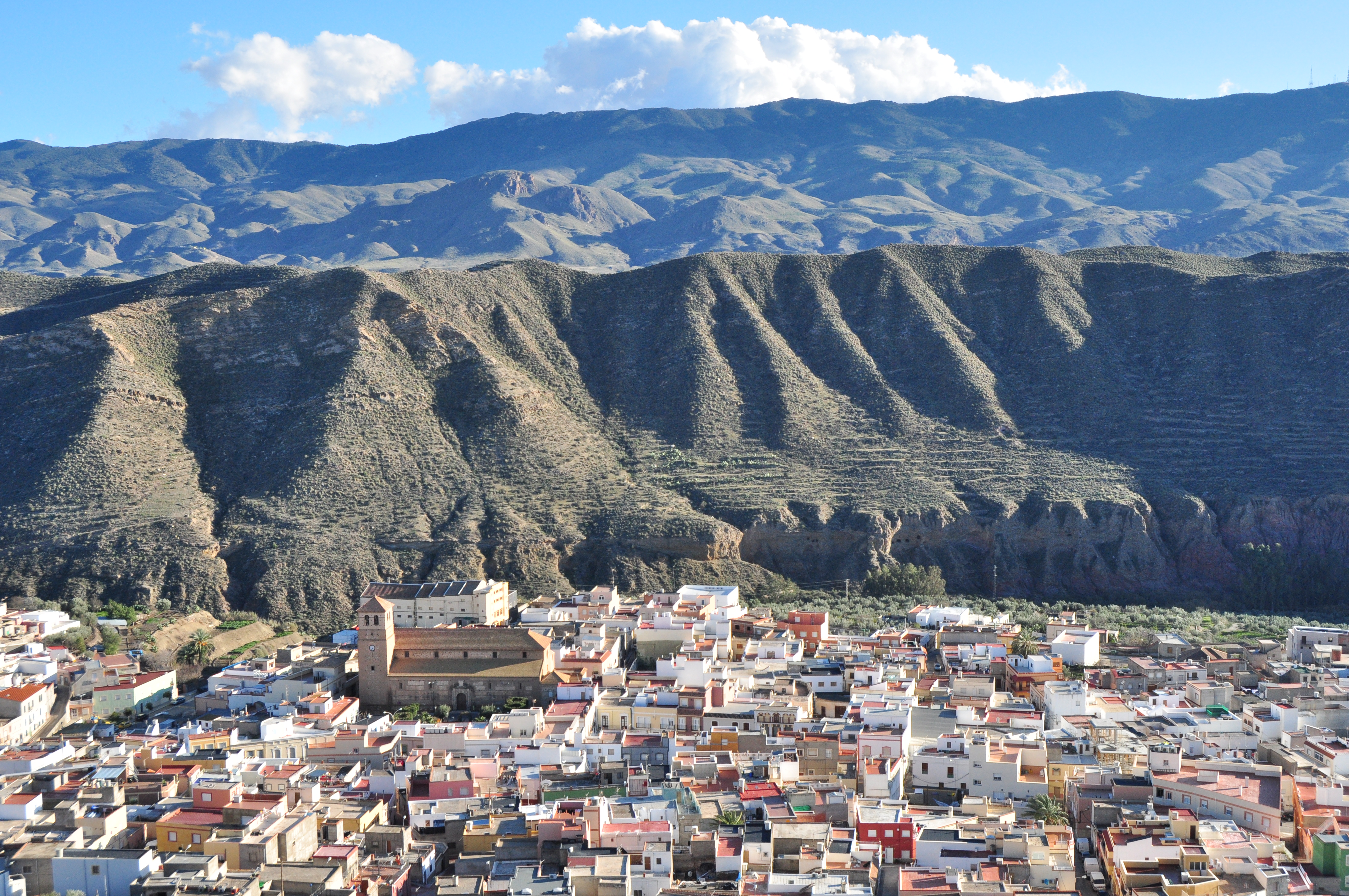 Tabernas - 001